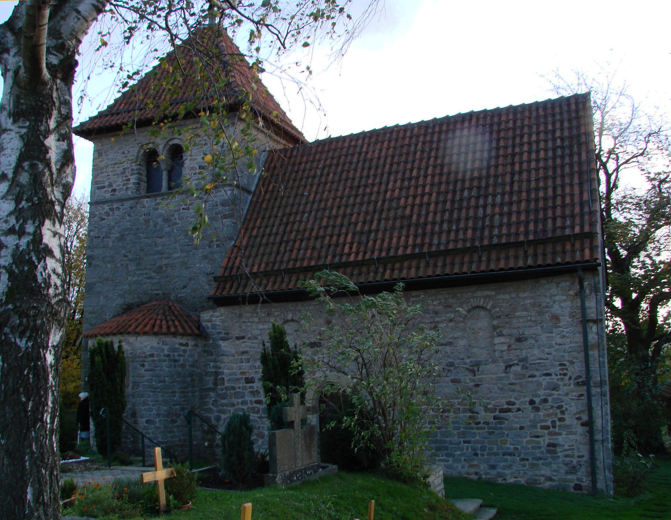 Oberstenfeld, Germany: Peterskirche (St. Peter's church)